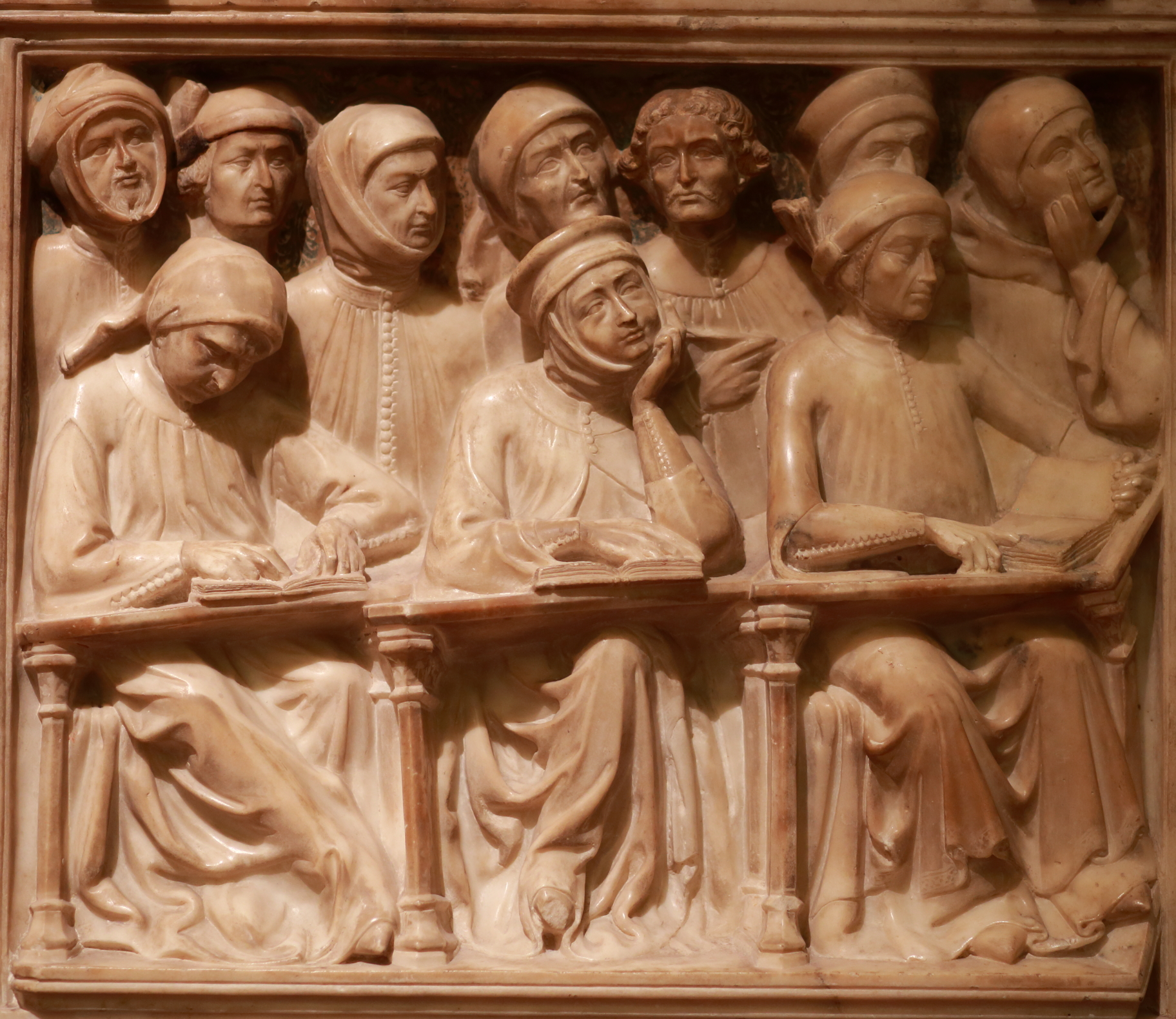 Bologna, Museo Civico Medievale. Frammenti dell'arca di Giovanni da Legnano (m. 1383). Di Pier Paolo dalle Masegne. This is a photo of a monument which is part of cultural heritage of Italy.